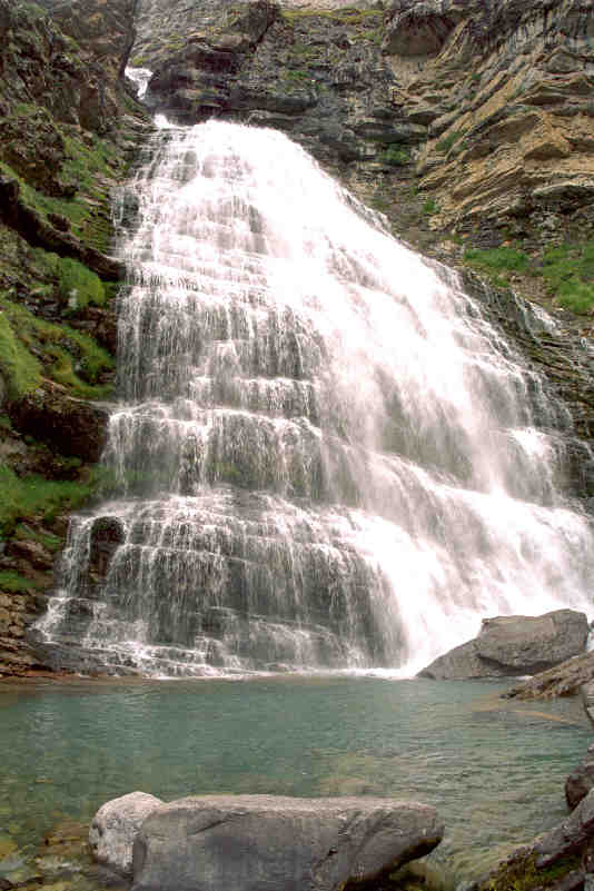 Cascada de Soaso o Cola de Caballo, en el Valle de Ordesa. Fotografía de José María Sánchez para Wikipedia Tomada el 21 de julio de 2003